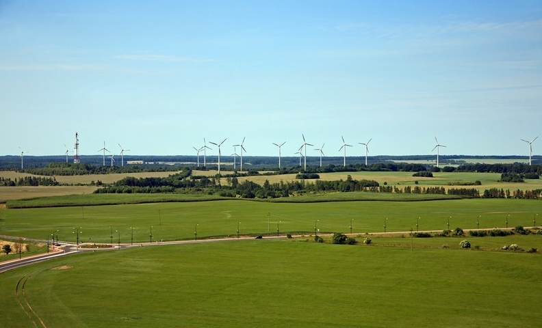 Gniewino, województwo pomorskie, powiat wejherowski, gmina Gniewino